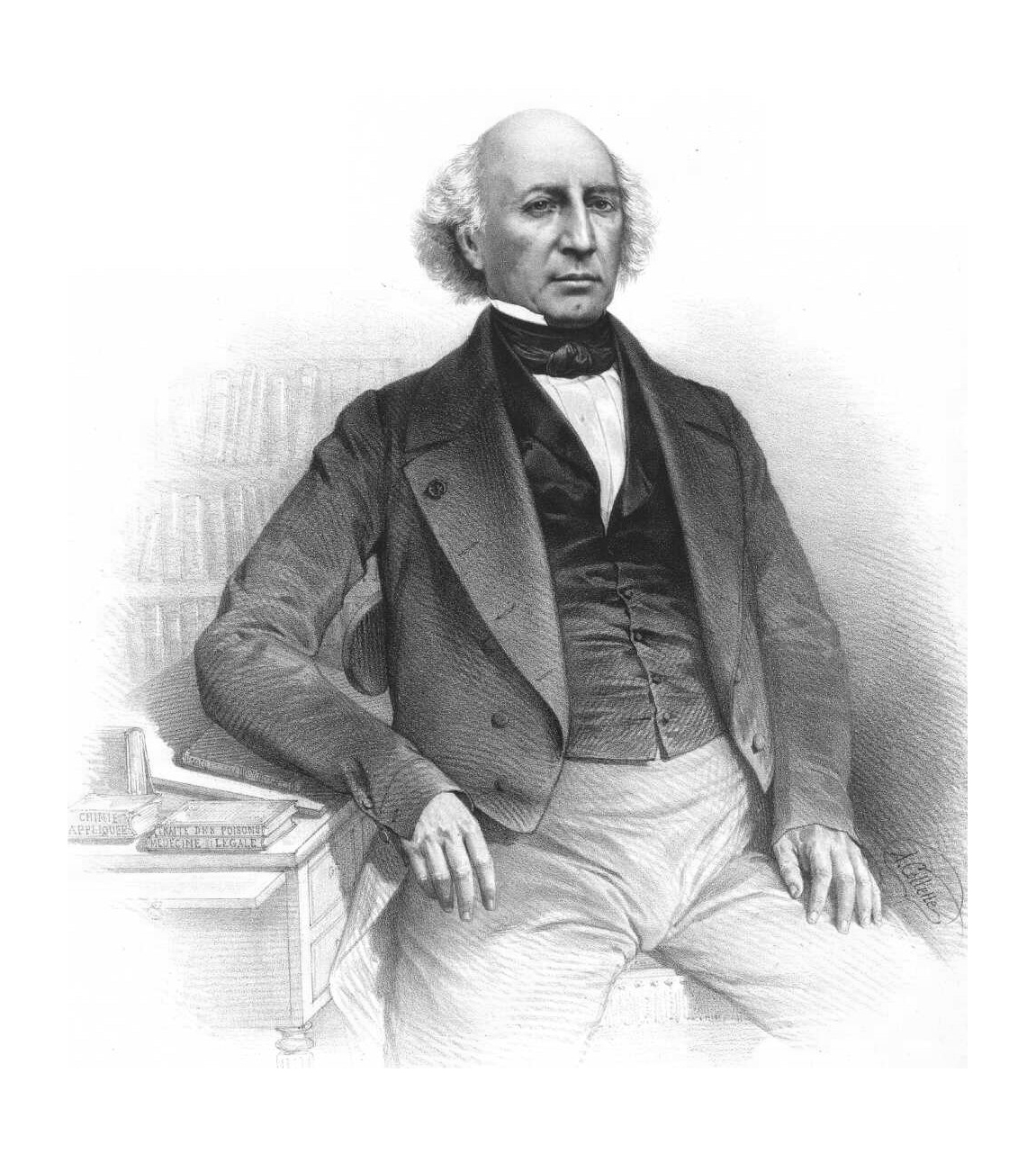 Abbildung von Mathieu Orfila